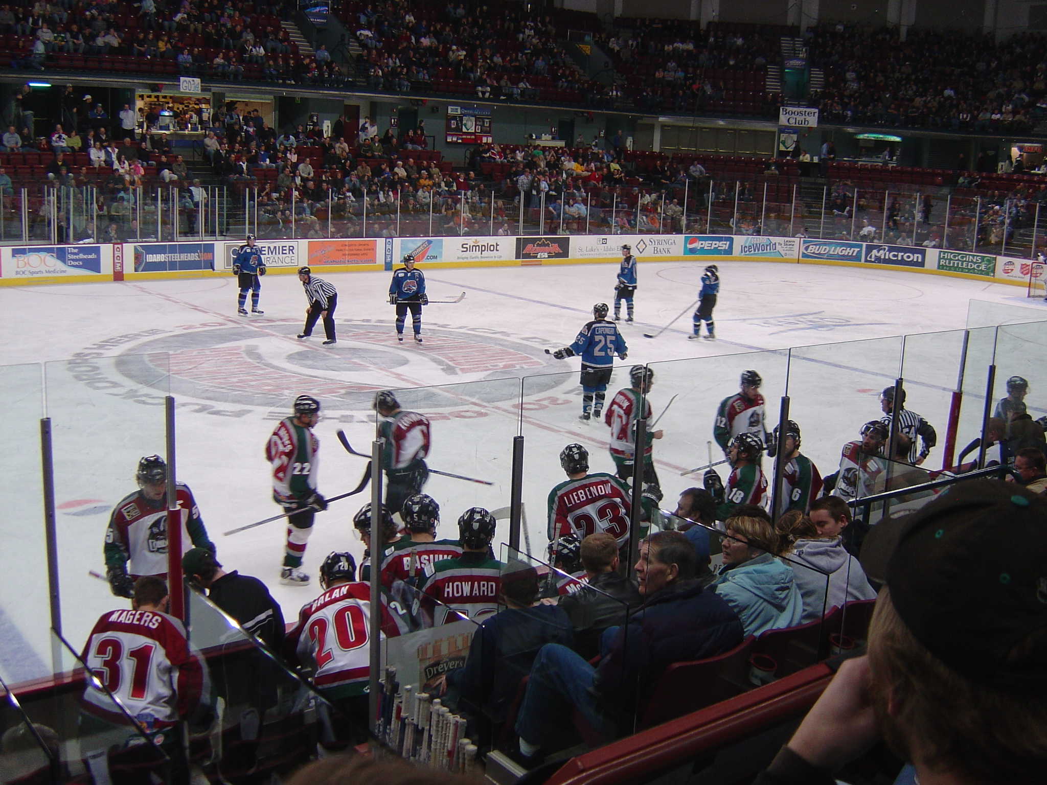 'Idaho Steelheads vs. Bakersfield Condors @ Qwest Arena in Boise, Idaho